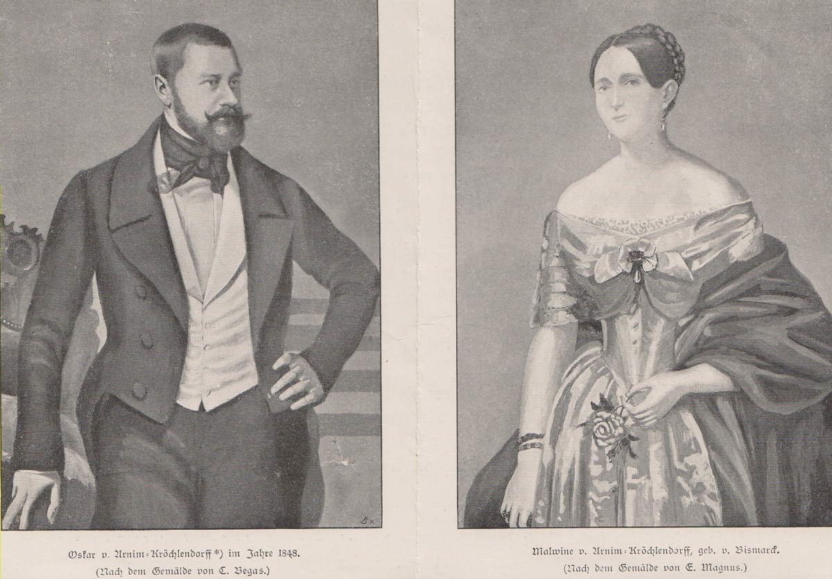 Abbildung der Gemälde Oskar von Arnim-Kröchlendorff und seiner Gattin Malwine, geb v. Bismark. Das Original ist im Besitz von Gerhard Hund und stammt aus dem Nachlass seiner Schwiegermutter Erika Meyer (1899-1969), Nachfahrin von Sophie Eleonore Luise von Arnim (1759-1801).